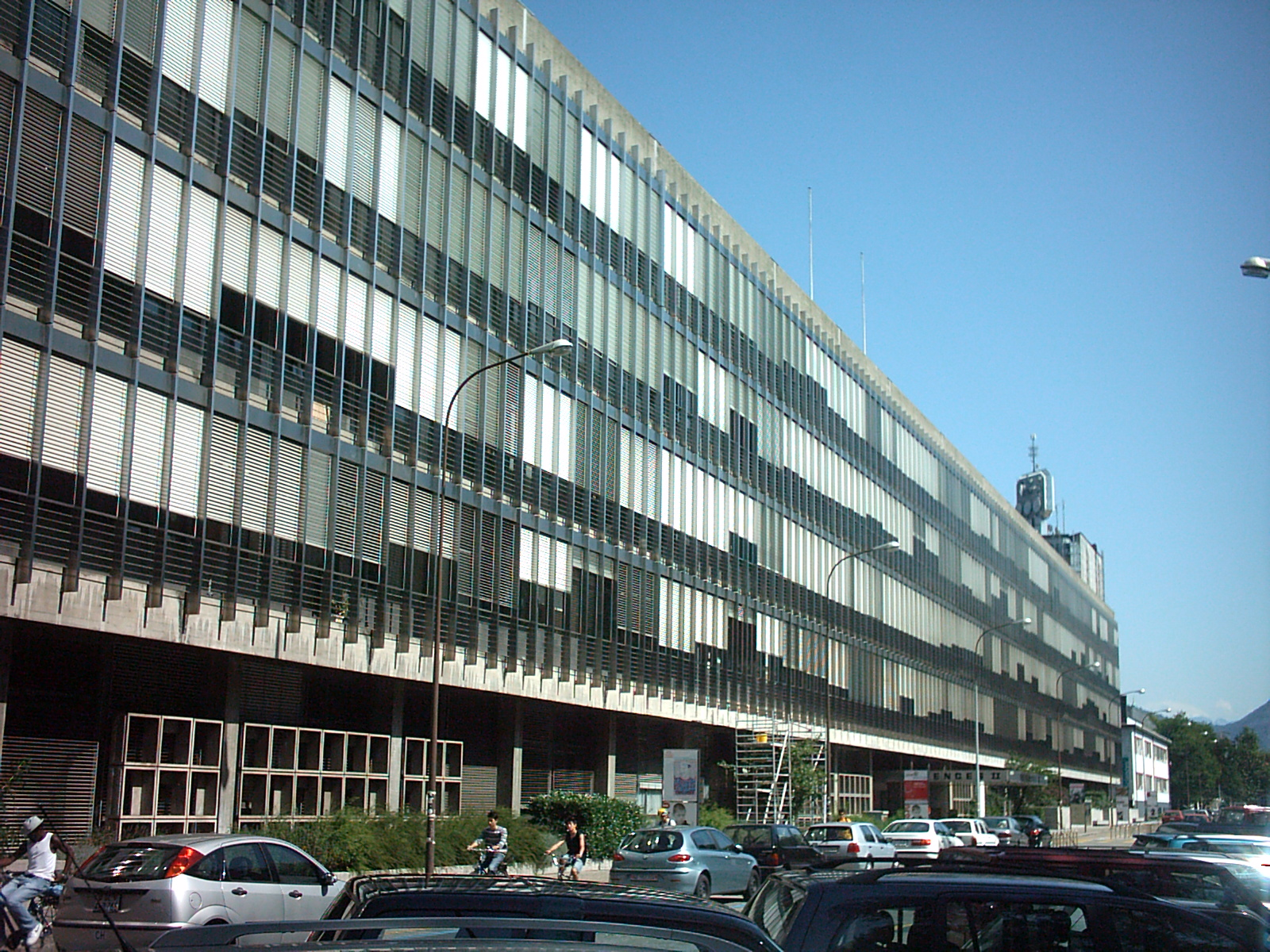 Bâtiment Sciences II à Genève (Suisse)